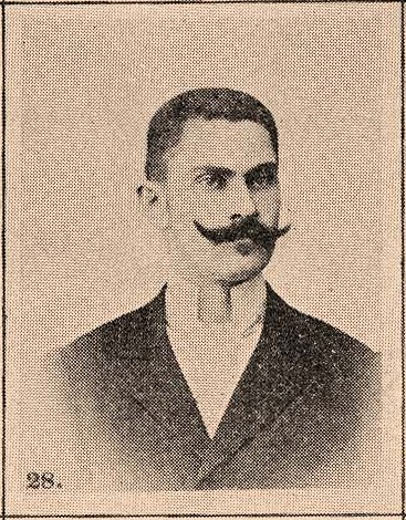 Váczy József szolgabíró (szikszói járás)